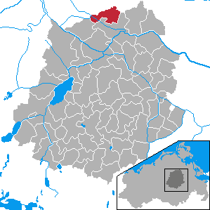 Düvier, Landkreis Demmin, Mecklenburg-Vorpommern